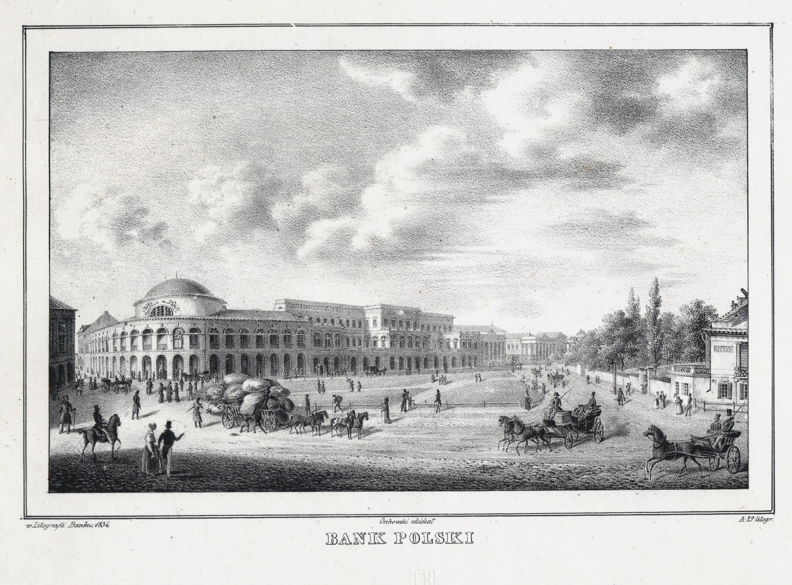 Adela Łubieńska, Bank Polski, 1834, litografia, Zakład Litograficzny Banku Polskiego (Warszawa), Biblioteka Narodowa